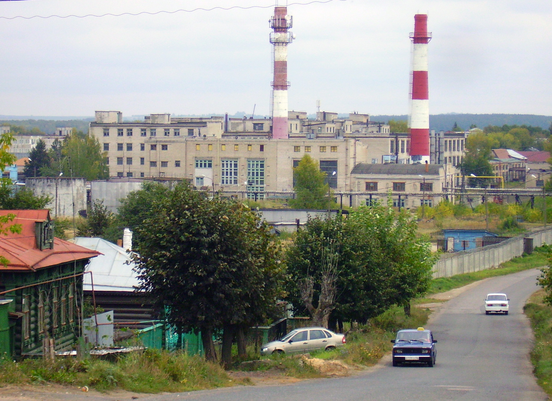 Zakharovskaya_Street Улица Захаровская